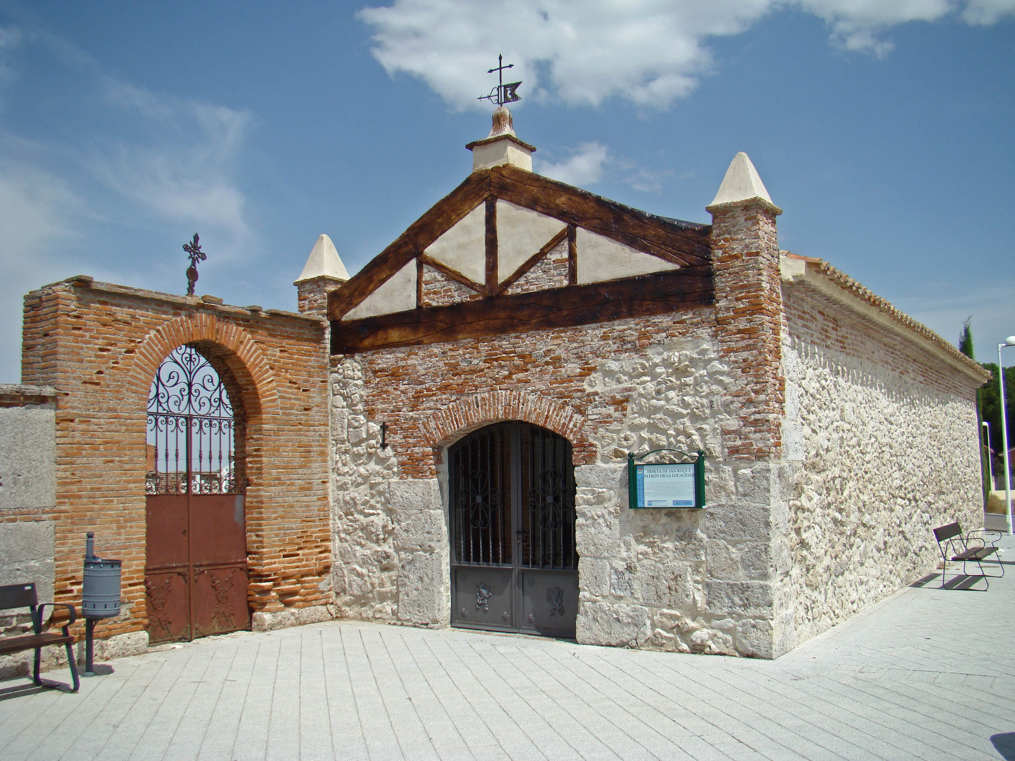 Ermita de San Roque junto al cementerio, en Aldeamayor de San Martín (Valladolid, España).